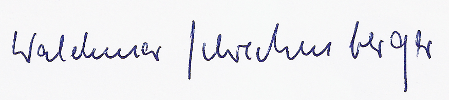 Waldemar Schreckenberger. Signatur seines Briefes an mich vom 1.2.1994